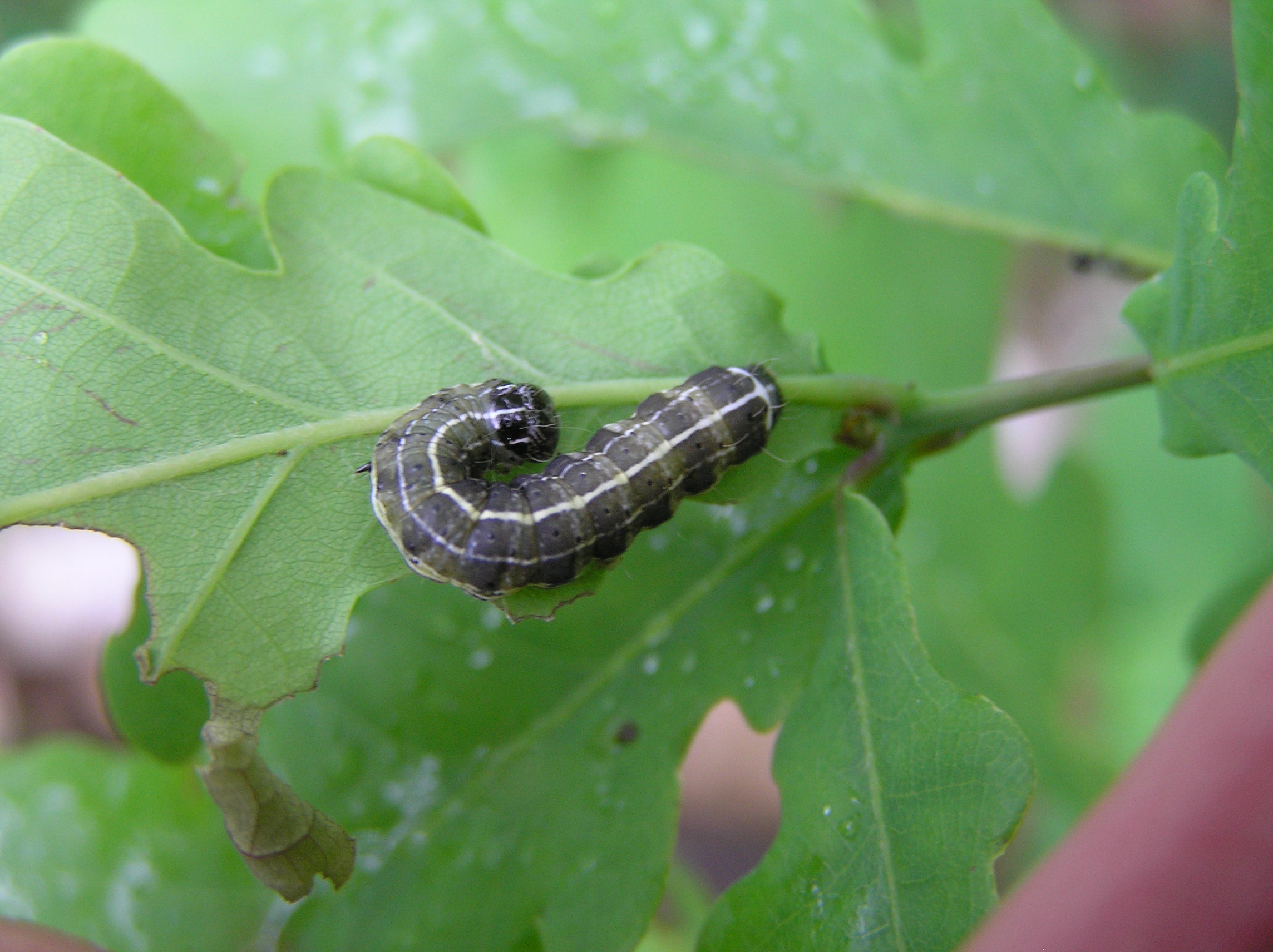 Orthosia cruda caterpillar